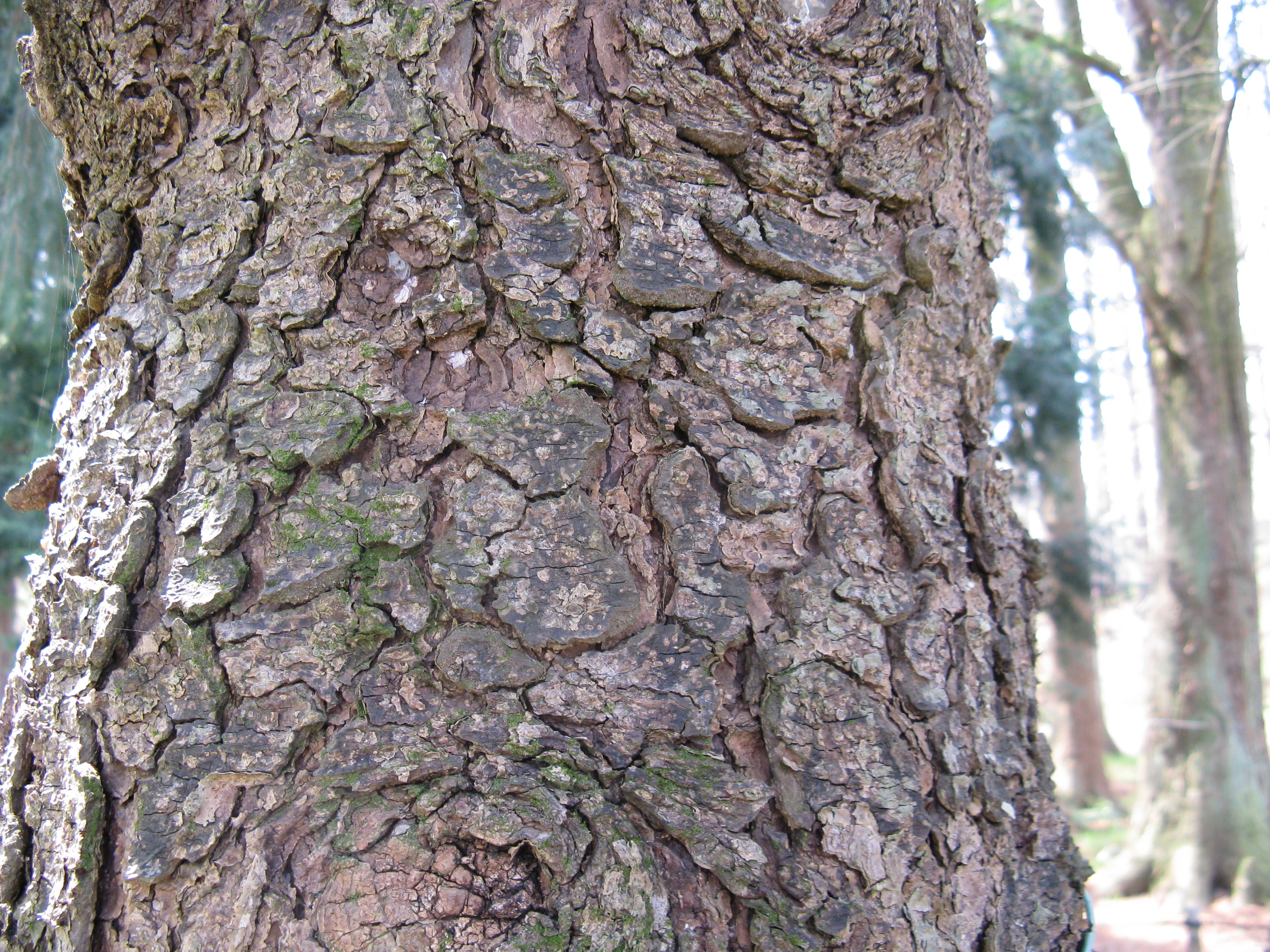 Picea glehnii